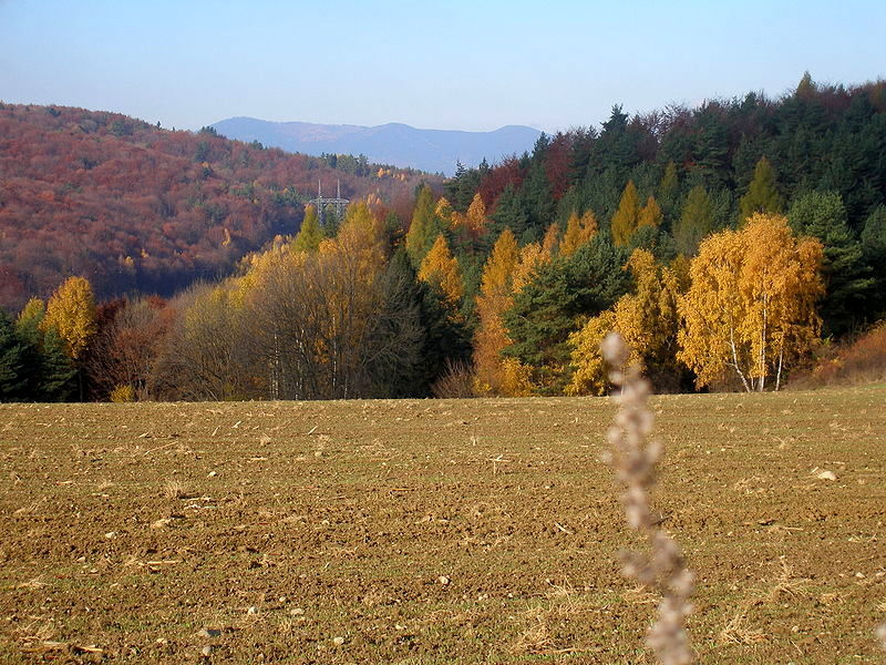 Jesenná krajina v Šarišskej vrchovine pri obci Klenov okres Prešov